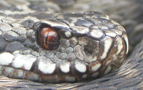 Vipera berus Description:Vipera berusAuthor:Zdeněk FricLicense:GFDL